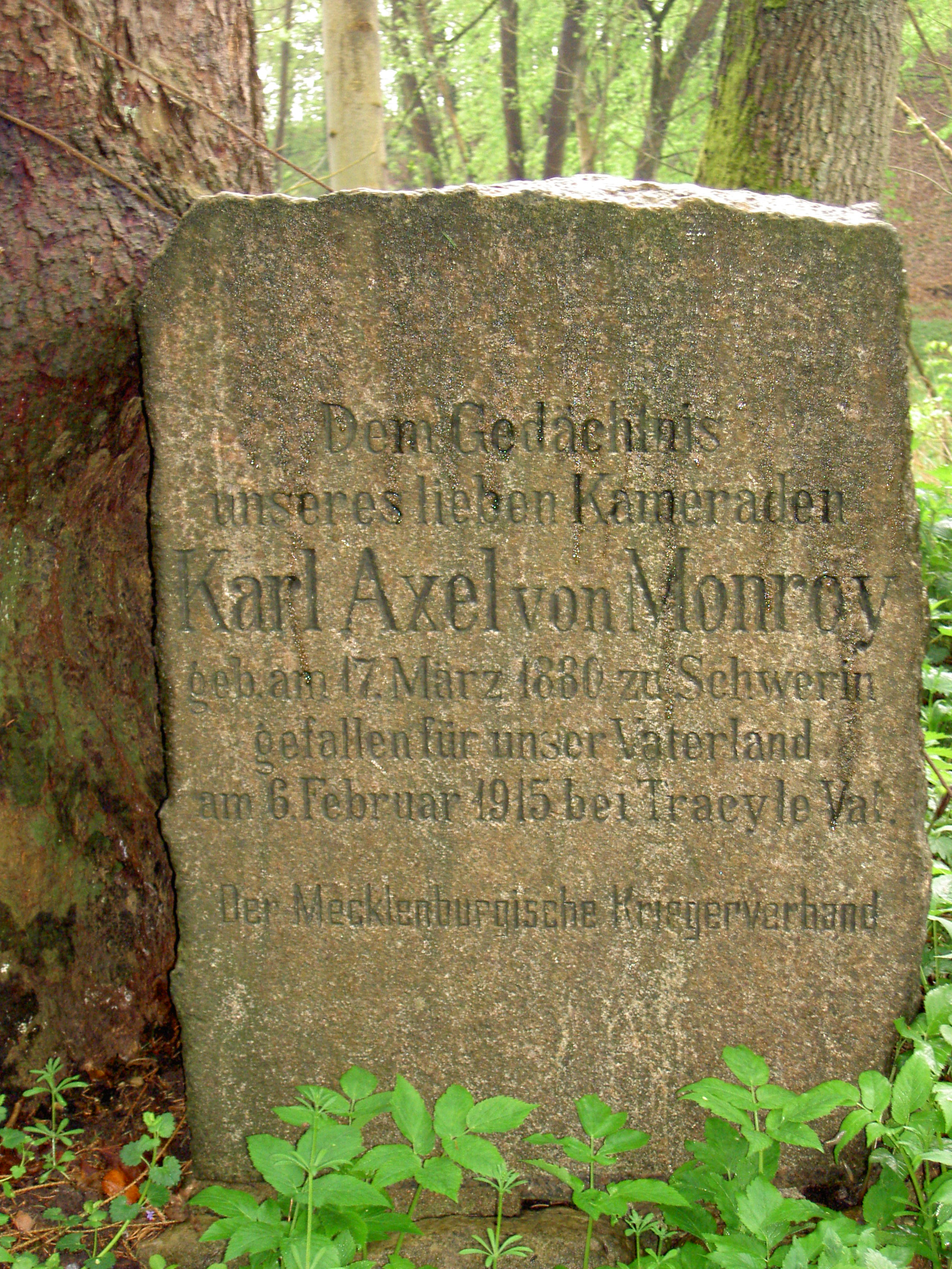 Gedenkstein für Karl Axel von Monroy im Schweriner Stadtteil Friedrichsthal